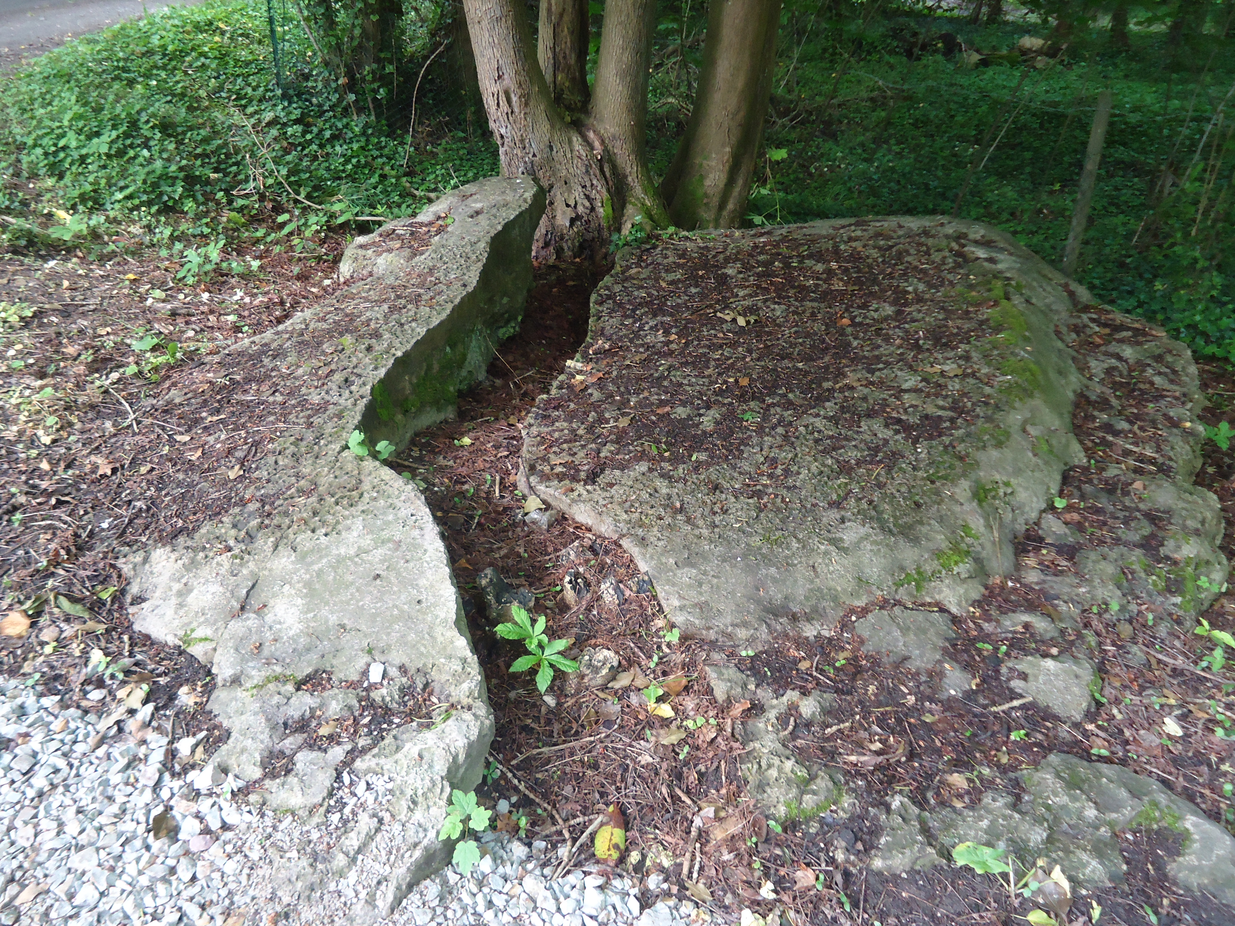 Menhir dit "Gravier de Gargantua" à Croth dans l'Eure